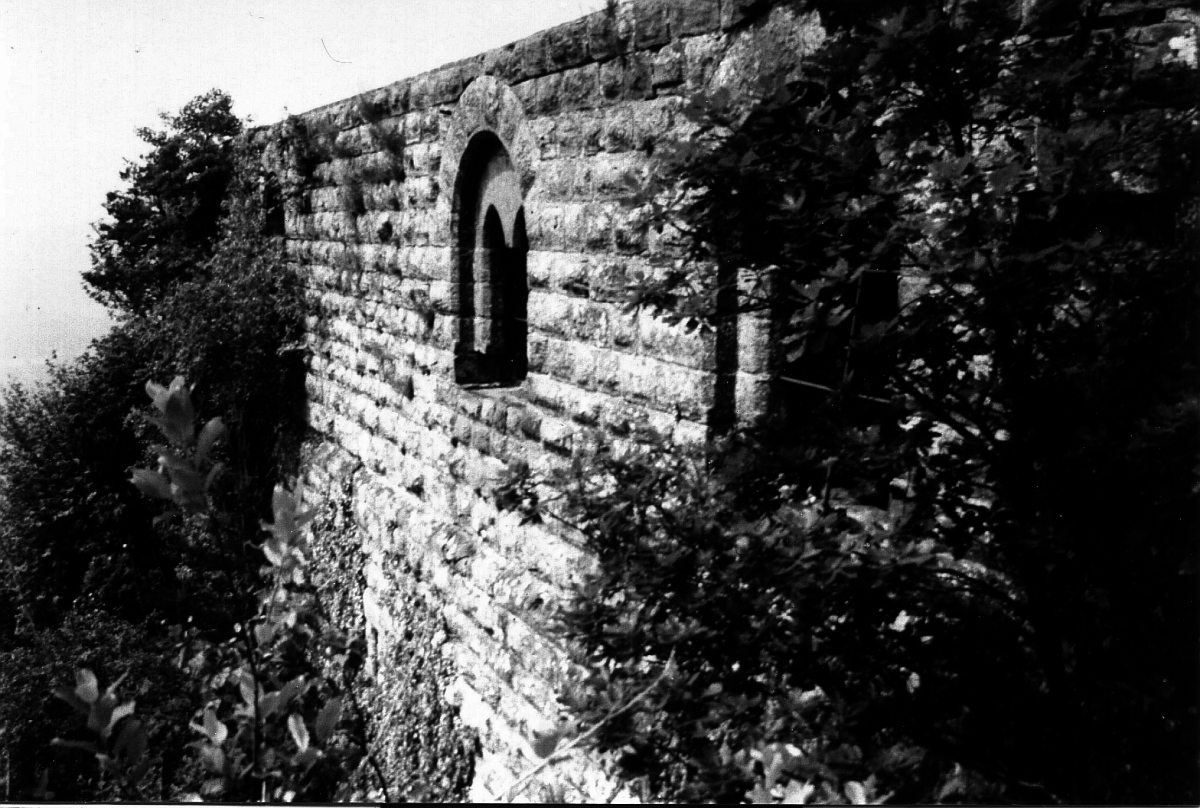 Burg Lindelbrunn, Palas, Aussenseite